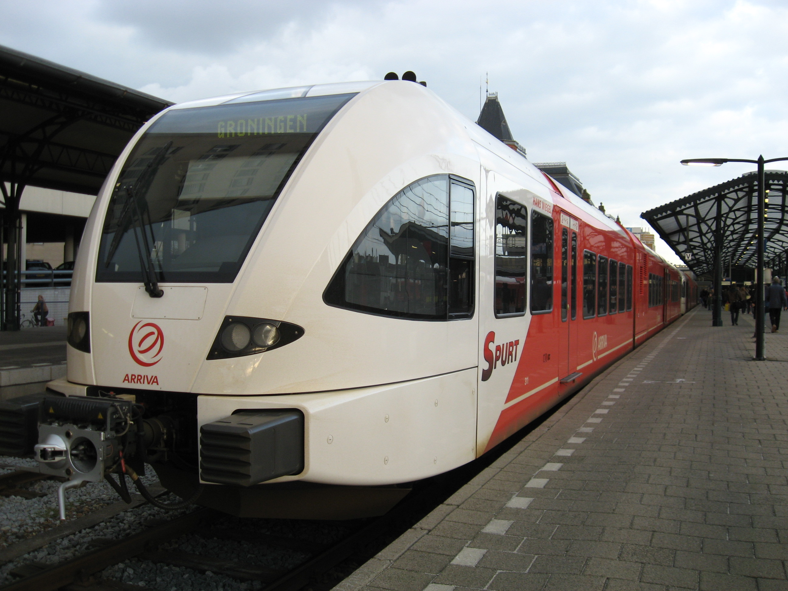 Groningen station met Arriva Spurts in 2009